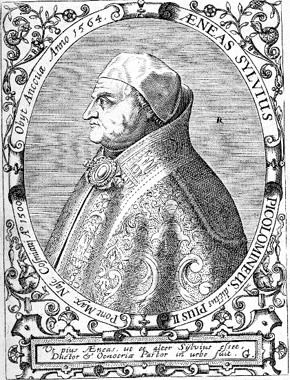 Paus Pius II Bron: Universiteit Mannheim Gebruiksrecht verleend